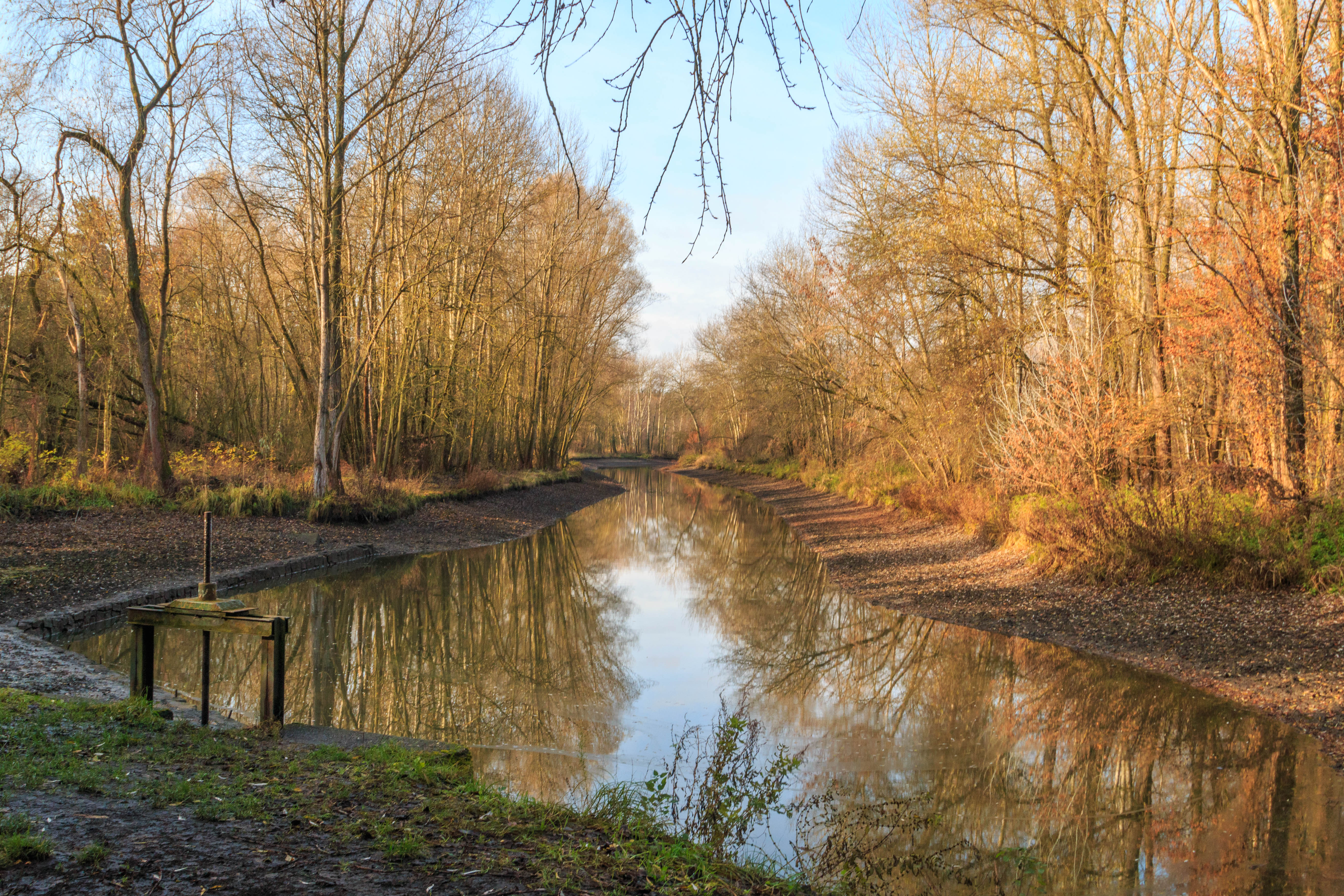 Pohránovský rybník Project: Vodstvo